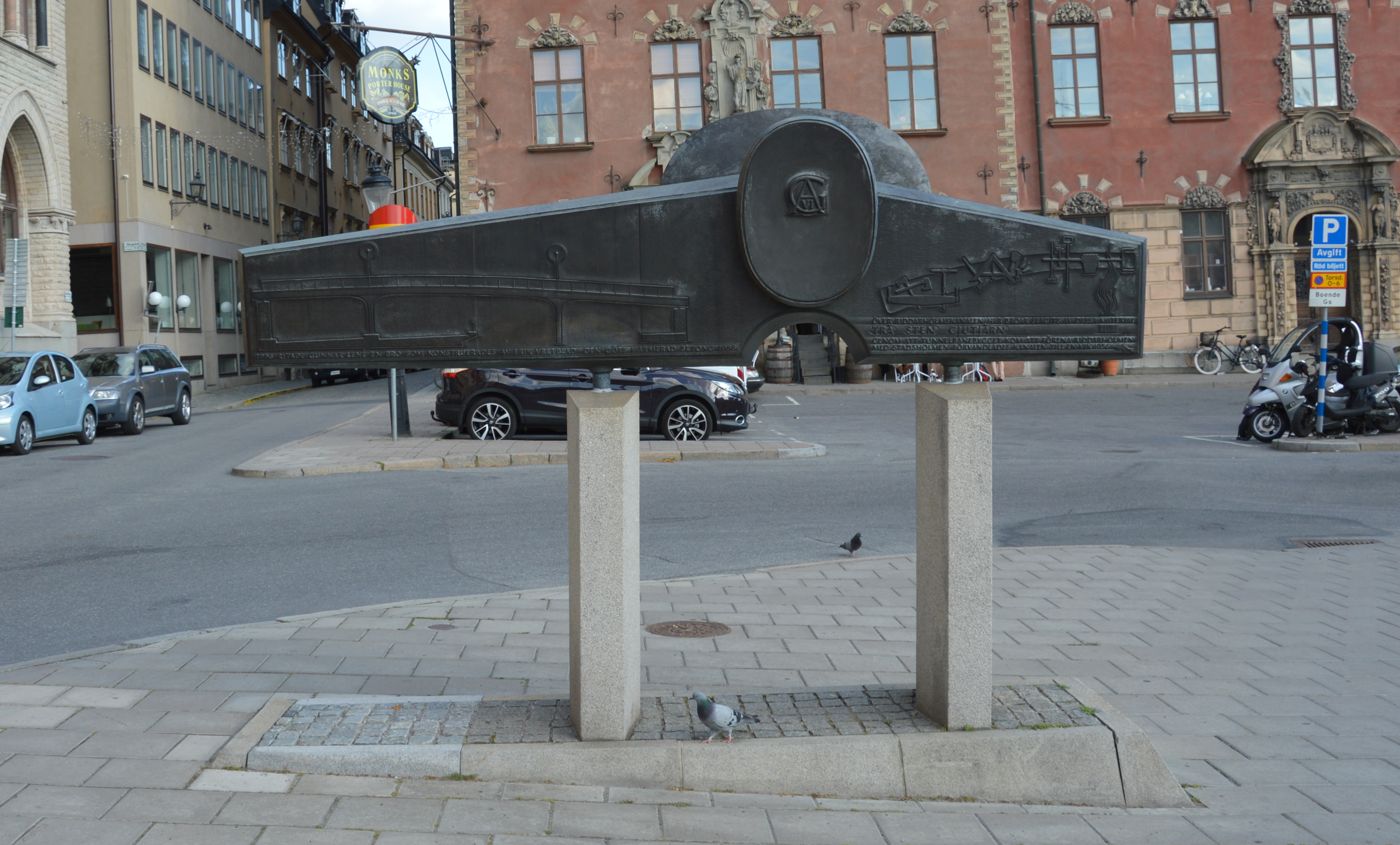 Riddarholmsbroarna